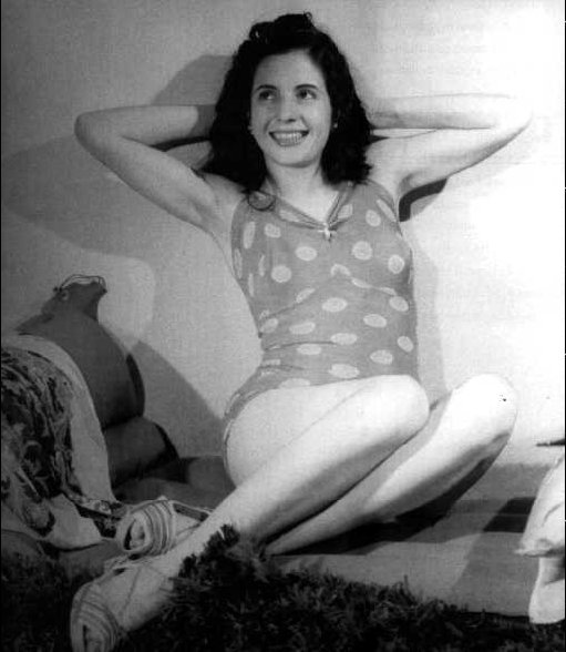 Eva Duarte (Evita) en malla con lunares